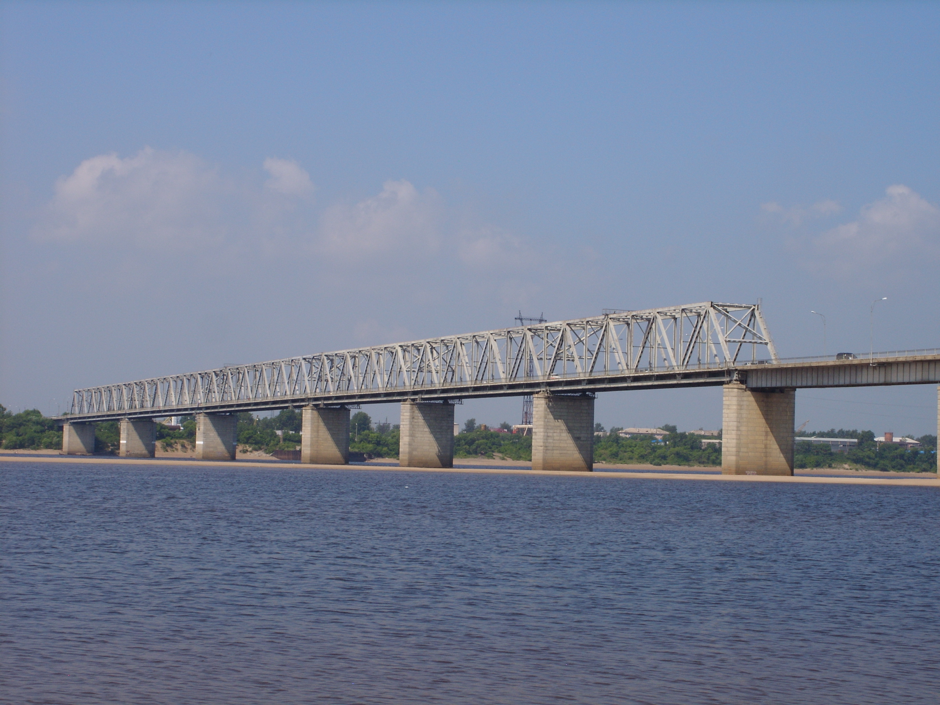 Снимки августа 2011 г.